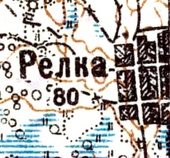 Топографическая карта Ленинградской области, квадрат VIc-26 (Ставотино), деревня Релка